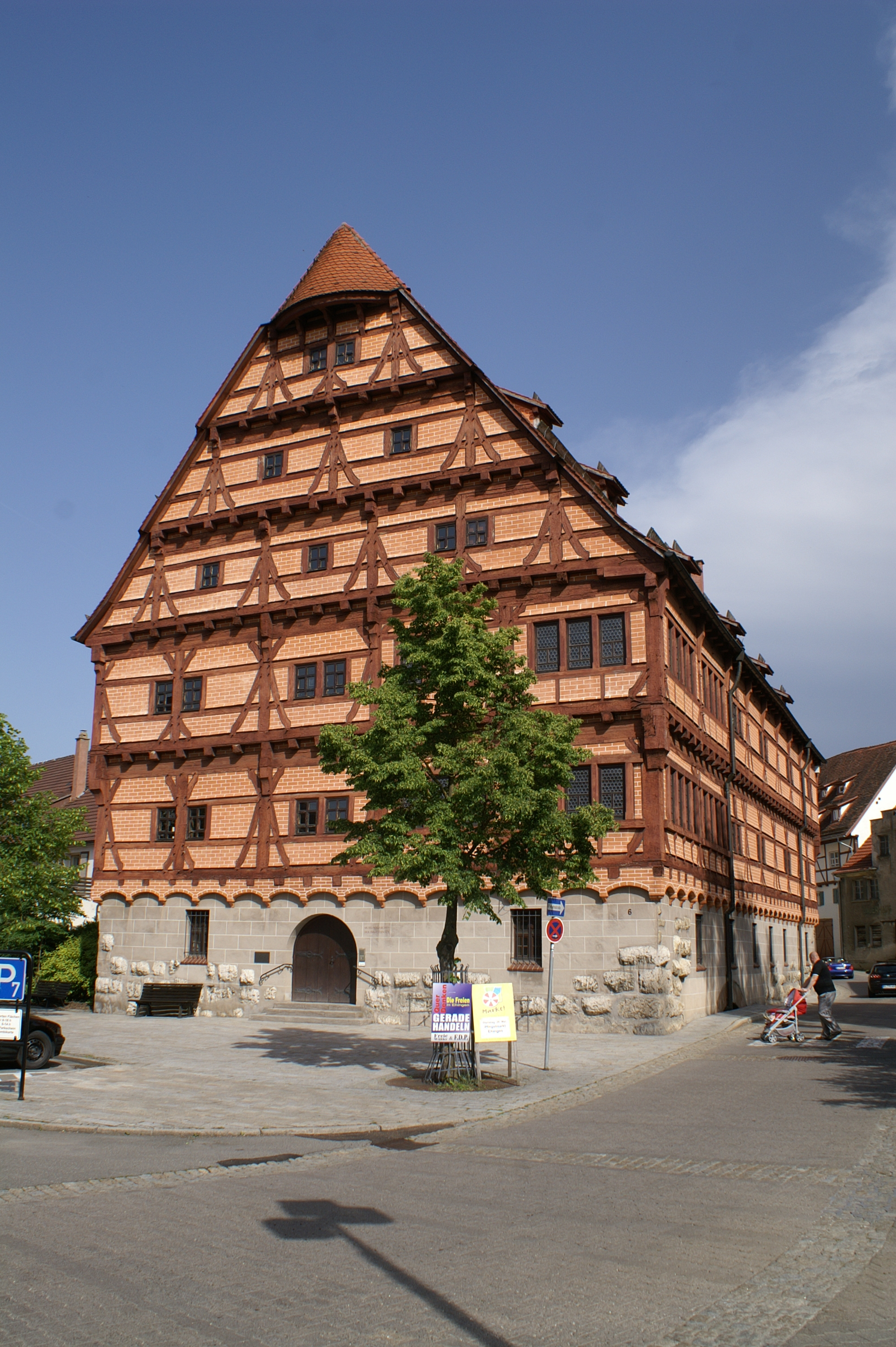 Das ehemalige Heilig-Geist-Spital in Ehingen (Donau) mit seinem repräsentativen Fachwerk wurde um 1532 errichtet. Heute sind in dem Gebäude und in der angebauten wiederhergestellten Spitalkapelle die Sammlungen des städtischen Museums untergebracht.